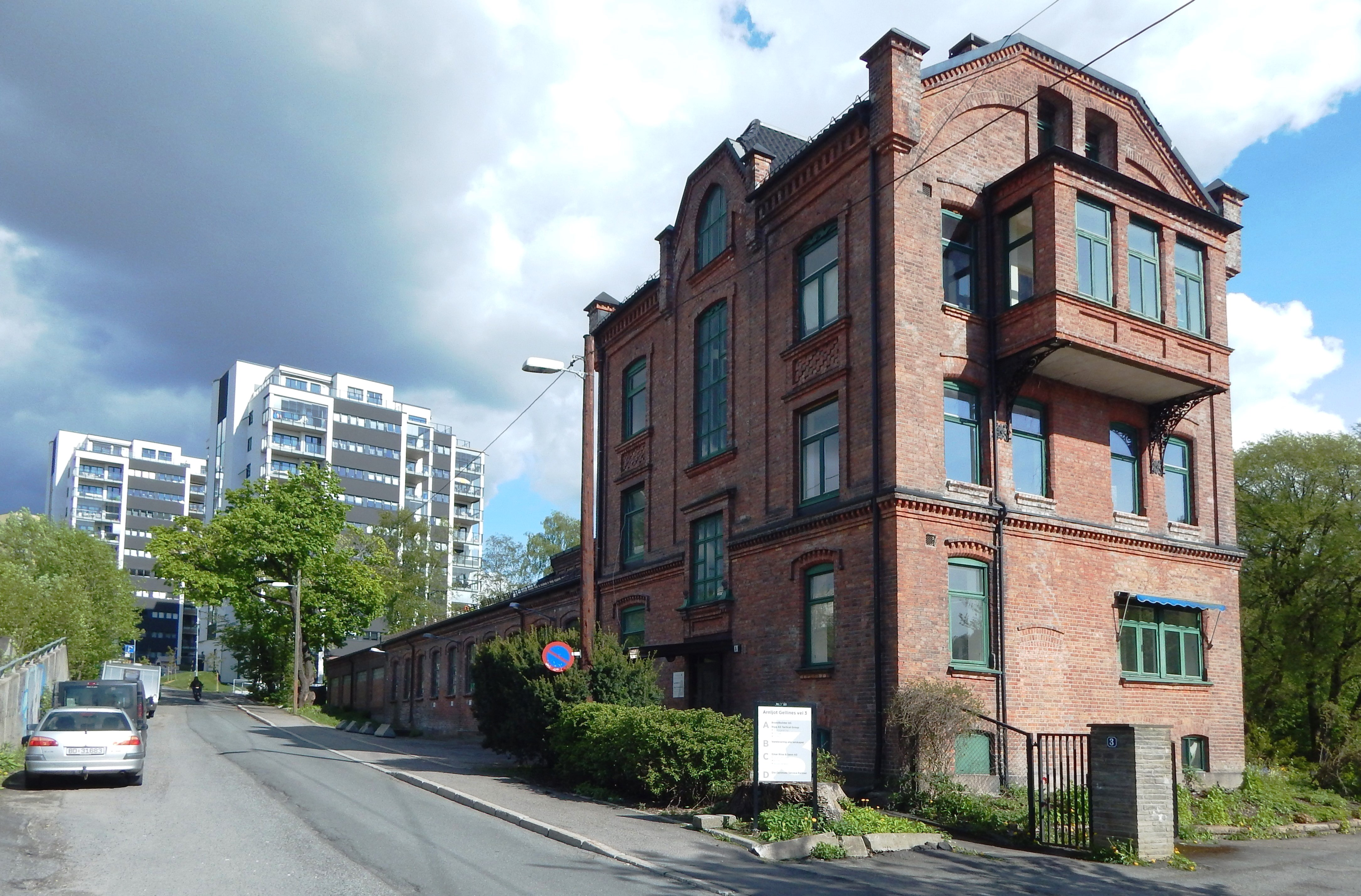 Arnljot Gellines vei 3, oppr. oppført for Christiania Kulsyrefabrik. Arkitekt: Halfdan Berle.